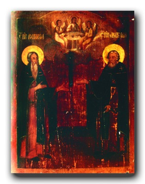 Преподобные Варнава Ветлужский и Макарий Унженский. Икона. 2-я пол. XIX в. (Церковь во имя прп. Варнавы Ветлужского в пос. Варнавино)